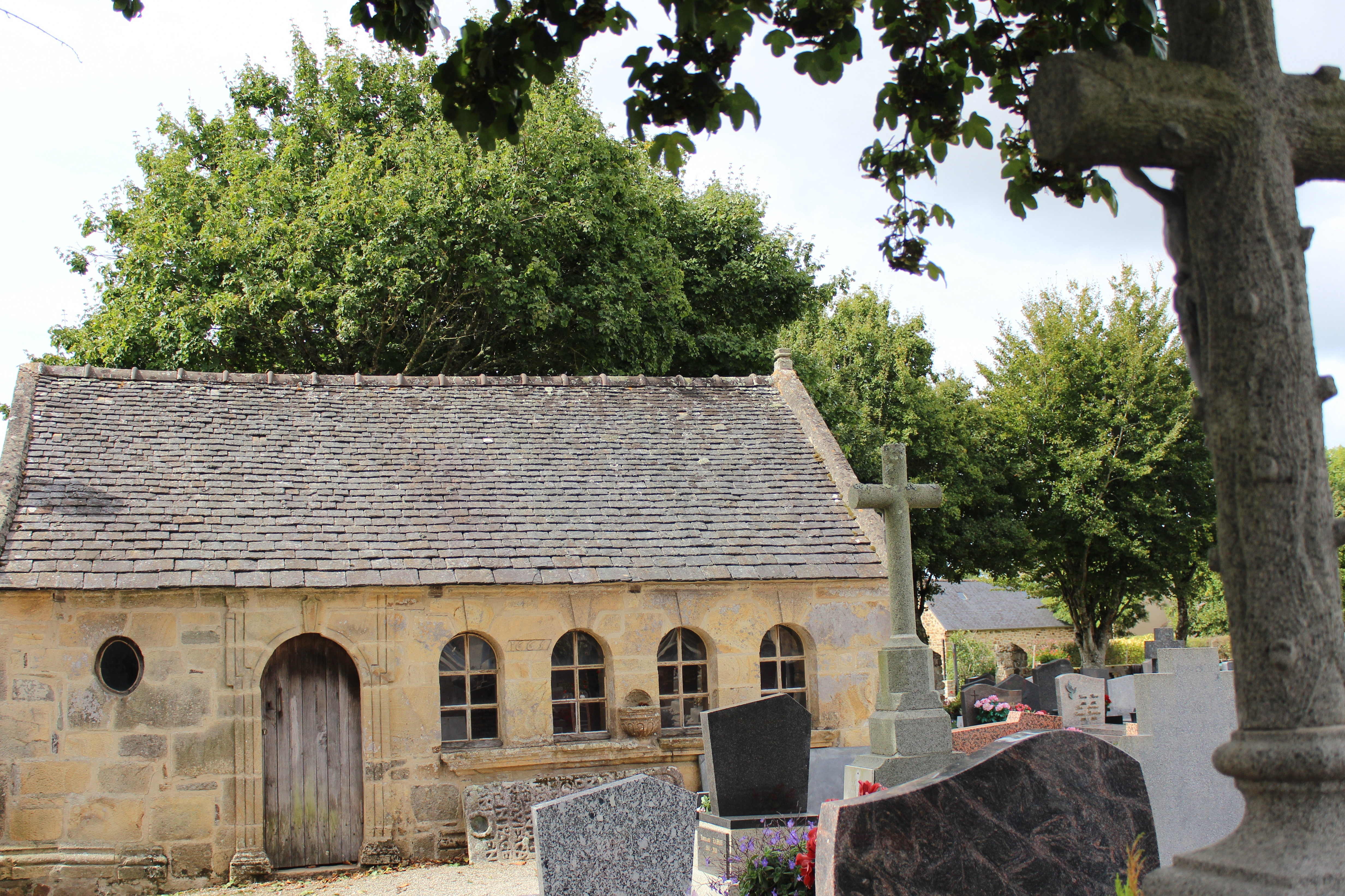 Ossuaire d'Argol